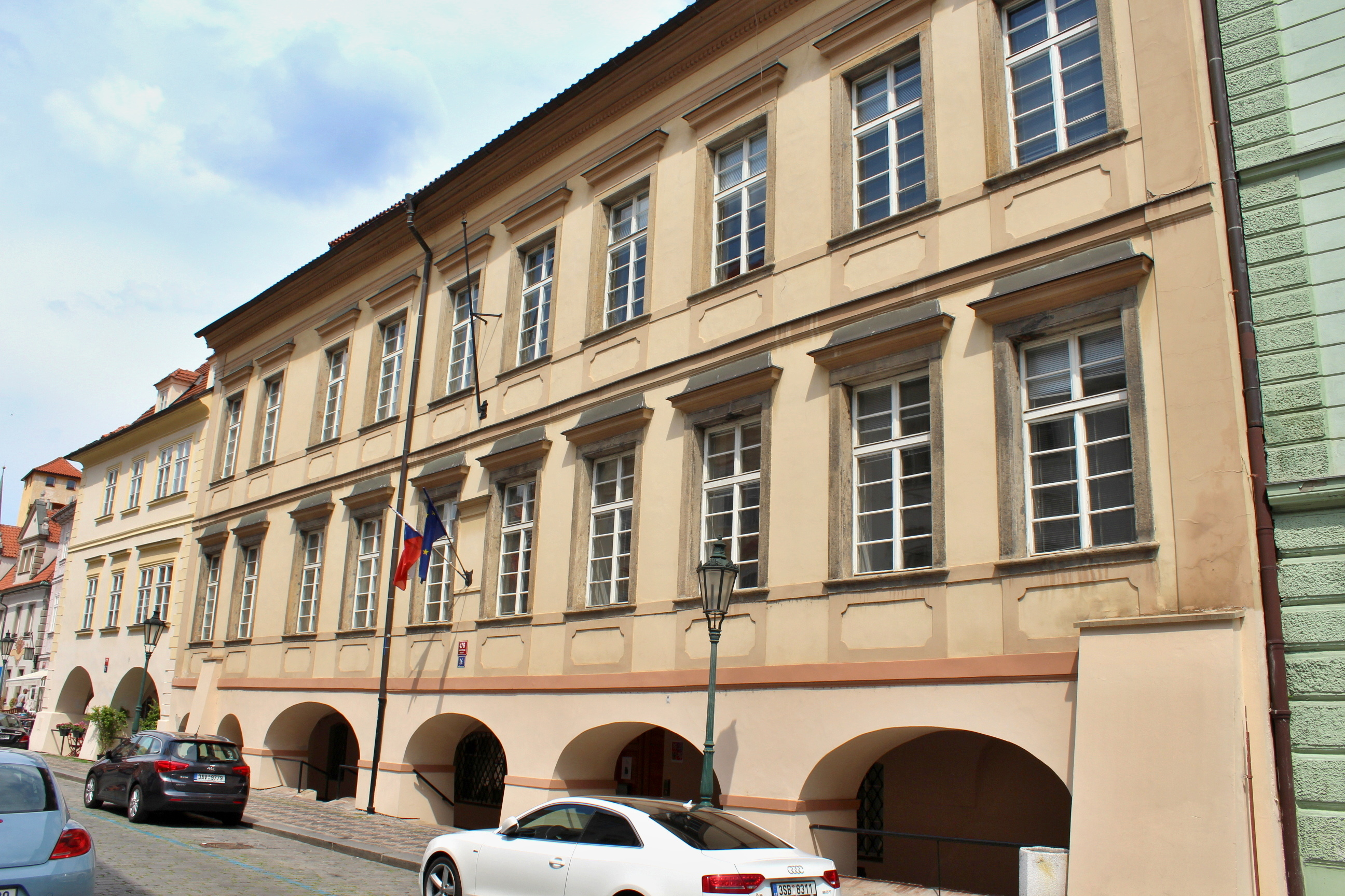 Malá Strana palác Straků z Nedabylic